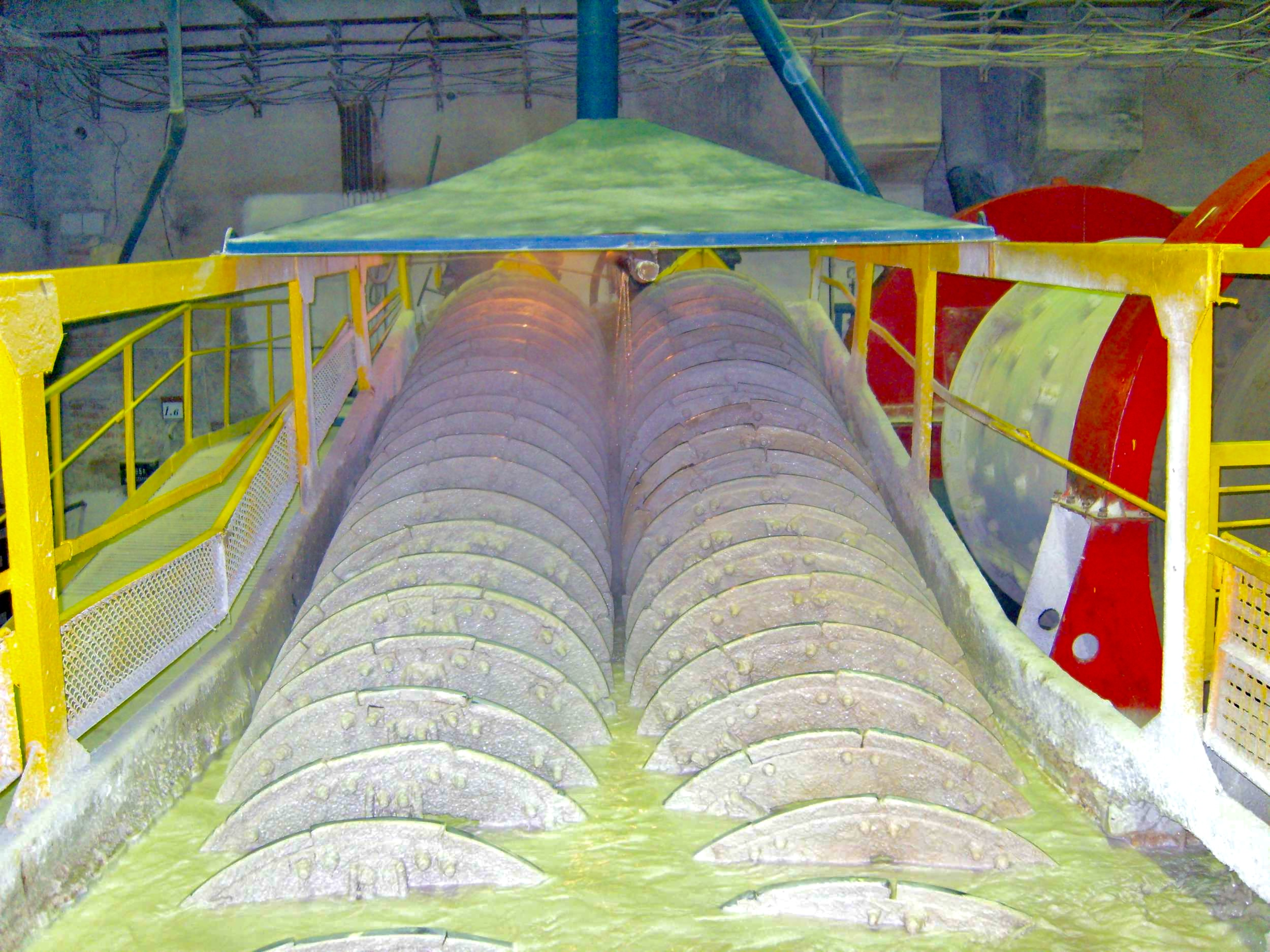 Спиральный сепаратор